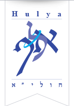 ארגון חולי"ה